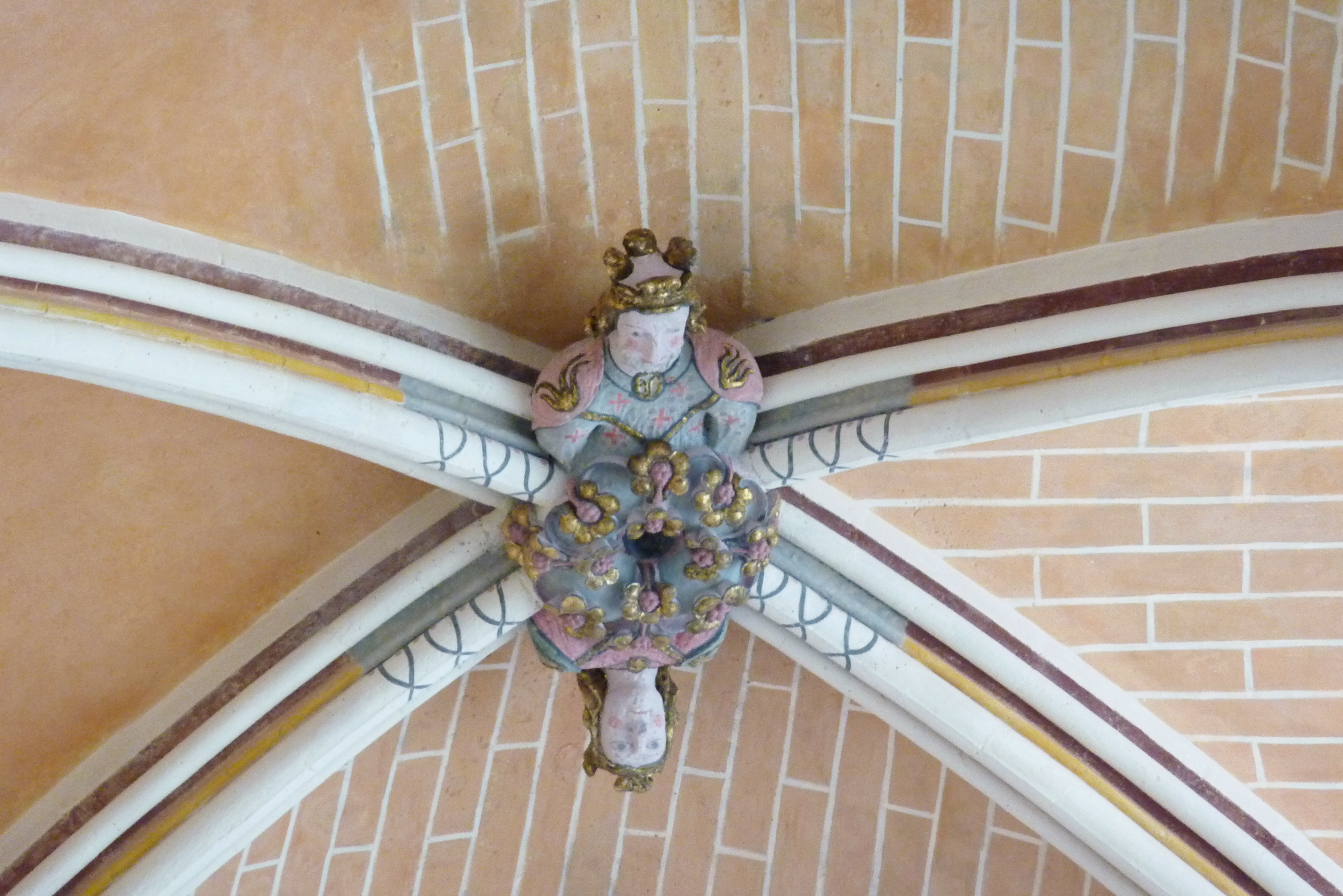 Katholische Pfarrkirche Saint-Étienne in Brie-Comte-Robert im Département Seine-et-Marne in der Region Île-de-France (Frankreich), Schlussstein im Chor